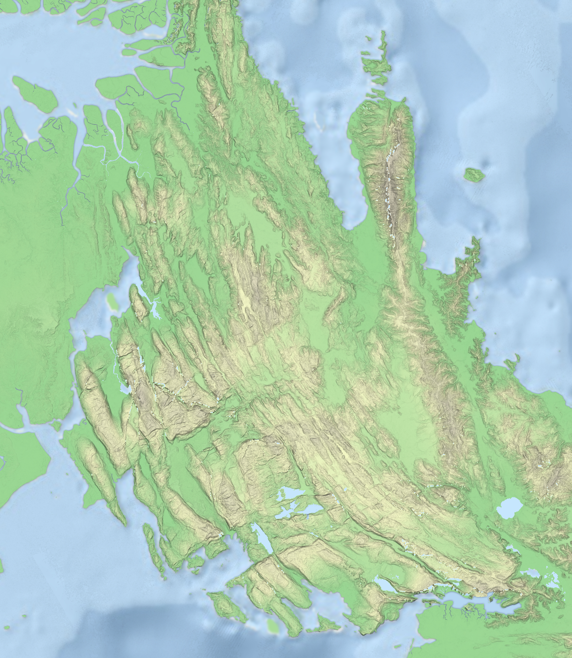 Carte topographique du massif de Lengguru